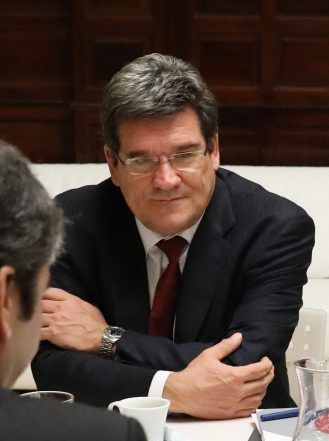 La alcaldesa ha mantenido una reunión de trabajo con el presidente de la AIREF Junto al delegado de Economía y Hacienda y la interventora general del Ayuntamiento 01/02/2019 La alcaldesa de Madrid, Manuela Carmena, ha mantenido hoy, viernes, una reunión de trabajo con José Luis Escrivá, presidente de la Autoridad Independiente de Responsabilidad Fiscal (AIREF), en su despacho del palacio de Cibeles.